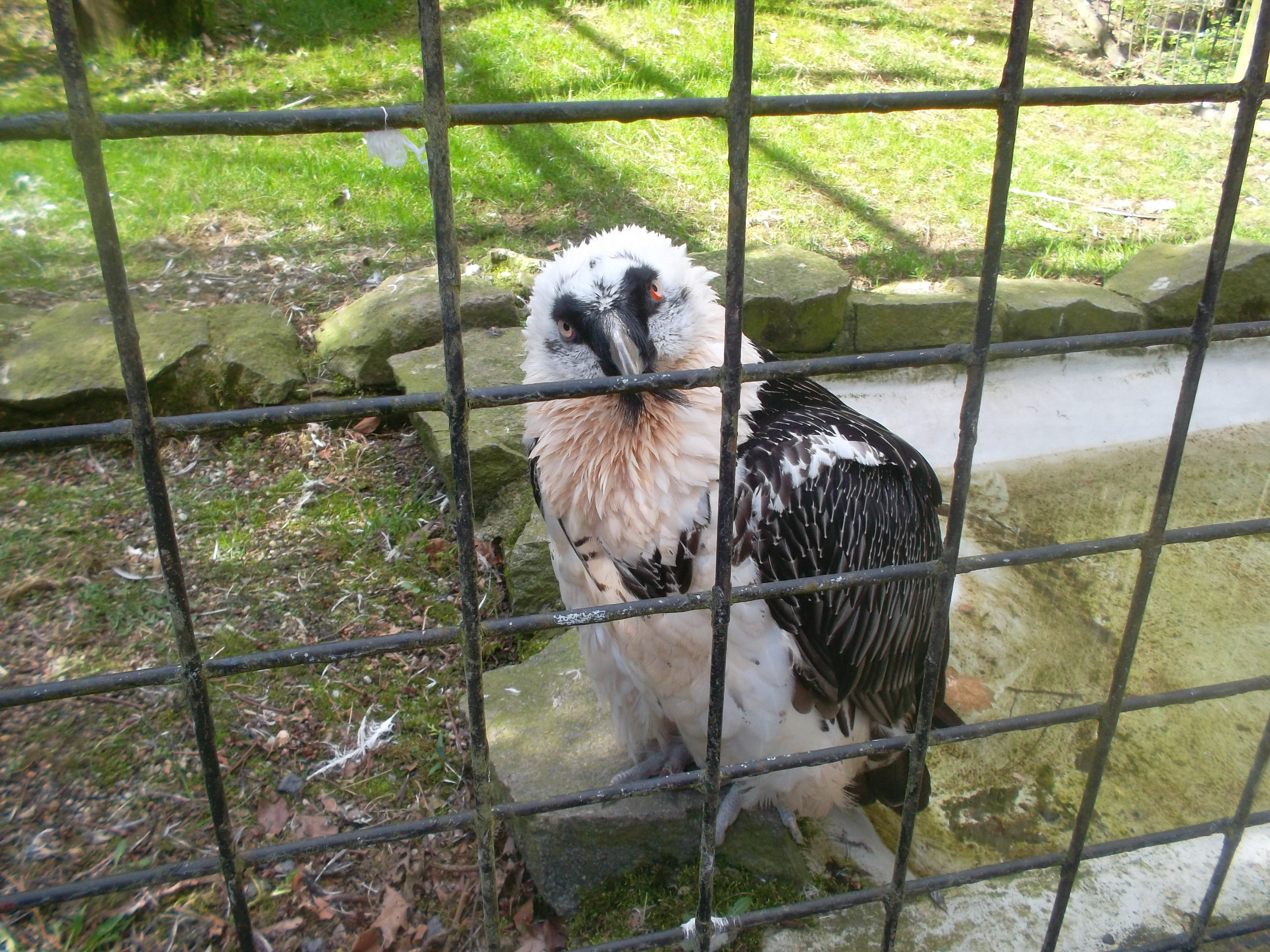 ein Bartgeier (Gypaetus barbatus barbatus) im Zoo Liberec